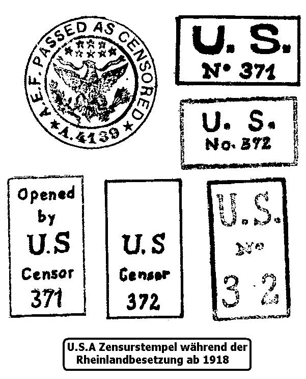 Amerikanische Zensurstempel während der Rheinlandbesetzung